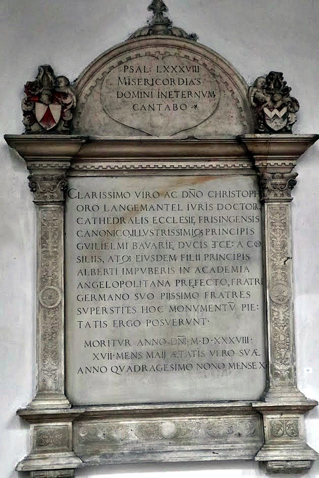 Epitaph Christoph Langenmantel vom Sparren (1488-1538), Domherr zu Freising, in der Franziskanerkirche Ingolstadt